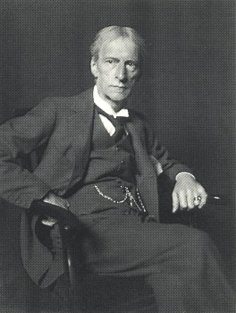 Porträt des Malers Hubert von Herkomer.